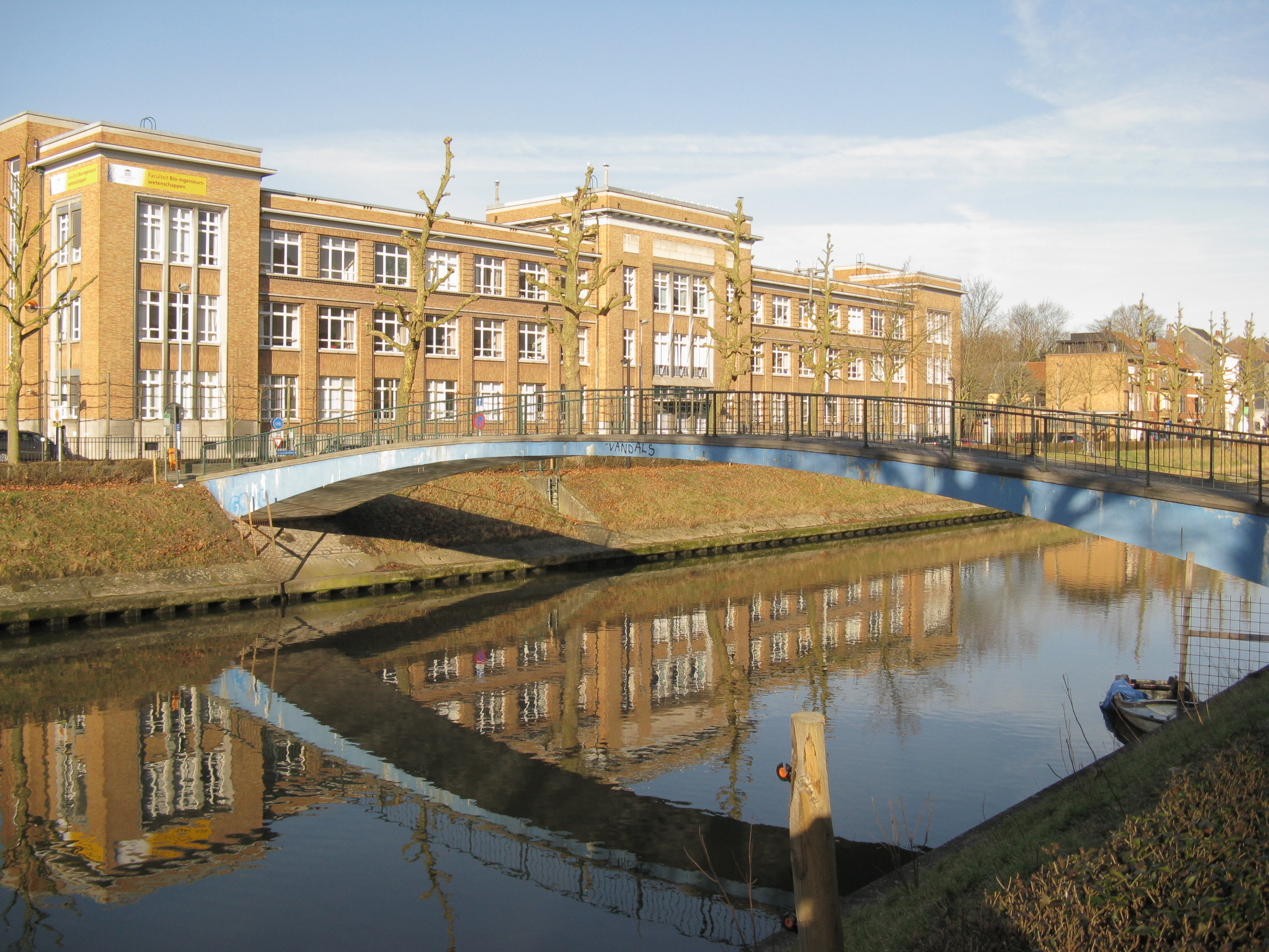 Het kanaal "Coupure" in Gent, België.